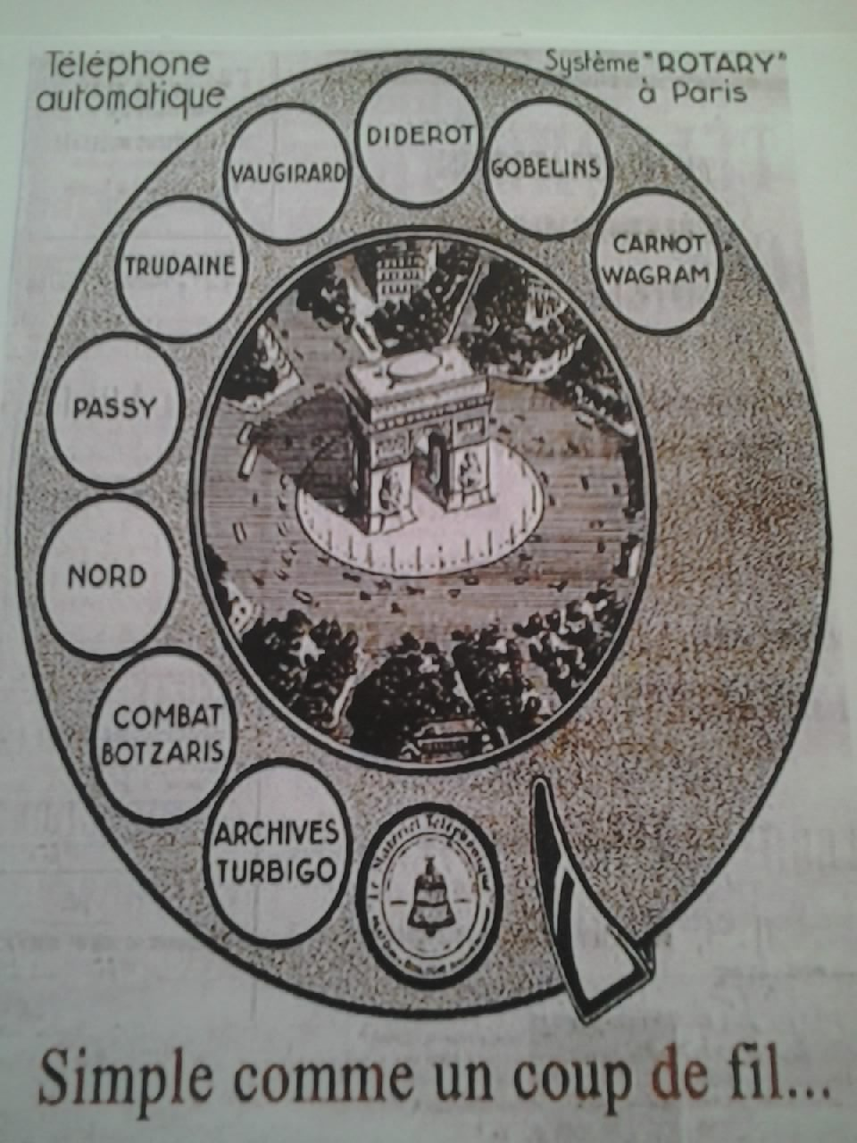 Annuaire téléphonique de Paris - 1931. Publicité pour le téléphone automatique. Collection de la Bibliothèque historique des Postes et des Télécommunications (BHPT), 89/91 rue Pelleport, XXe arrondissement, Paris, France.